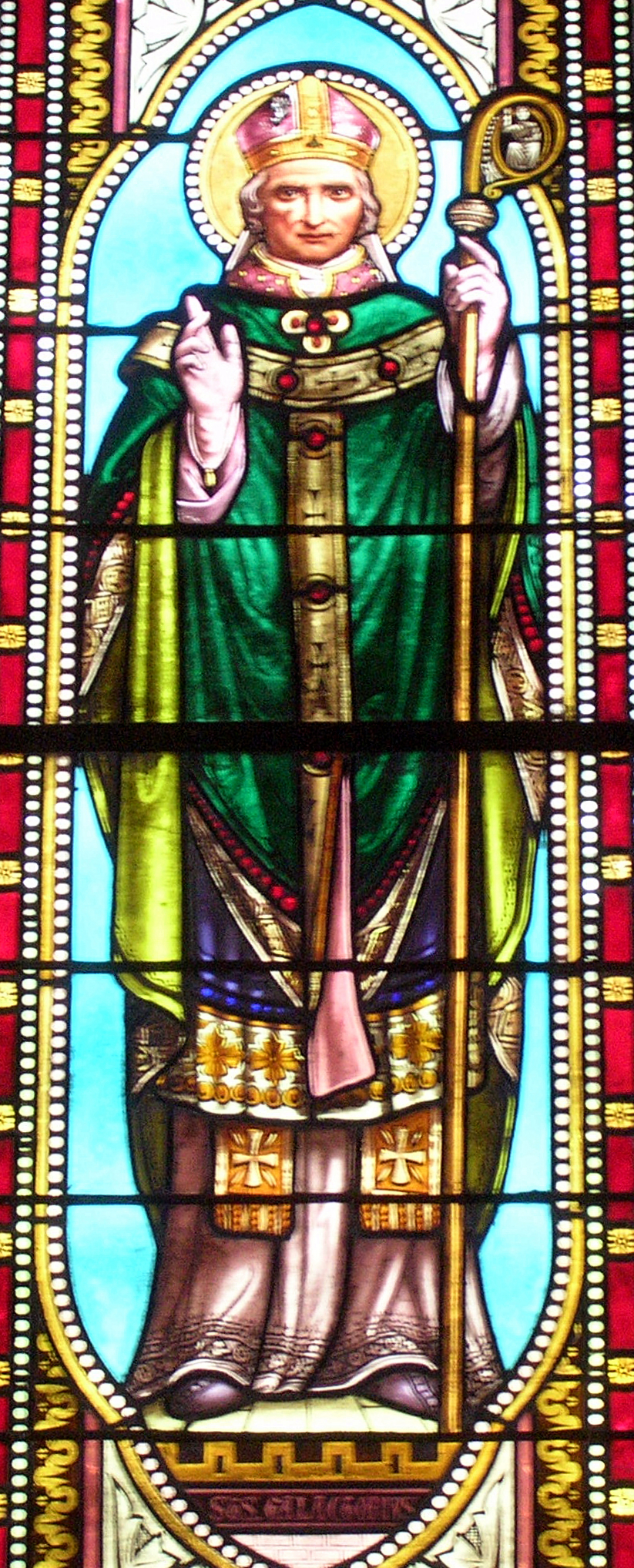 Vitrail de Saint Galactoire dans l'église Notre-Dame de l'Assomption de Mimizan-Bourg, dans le département français des Landes